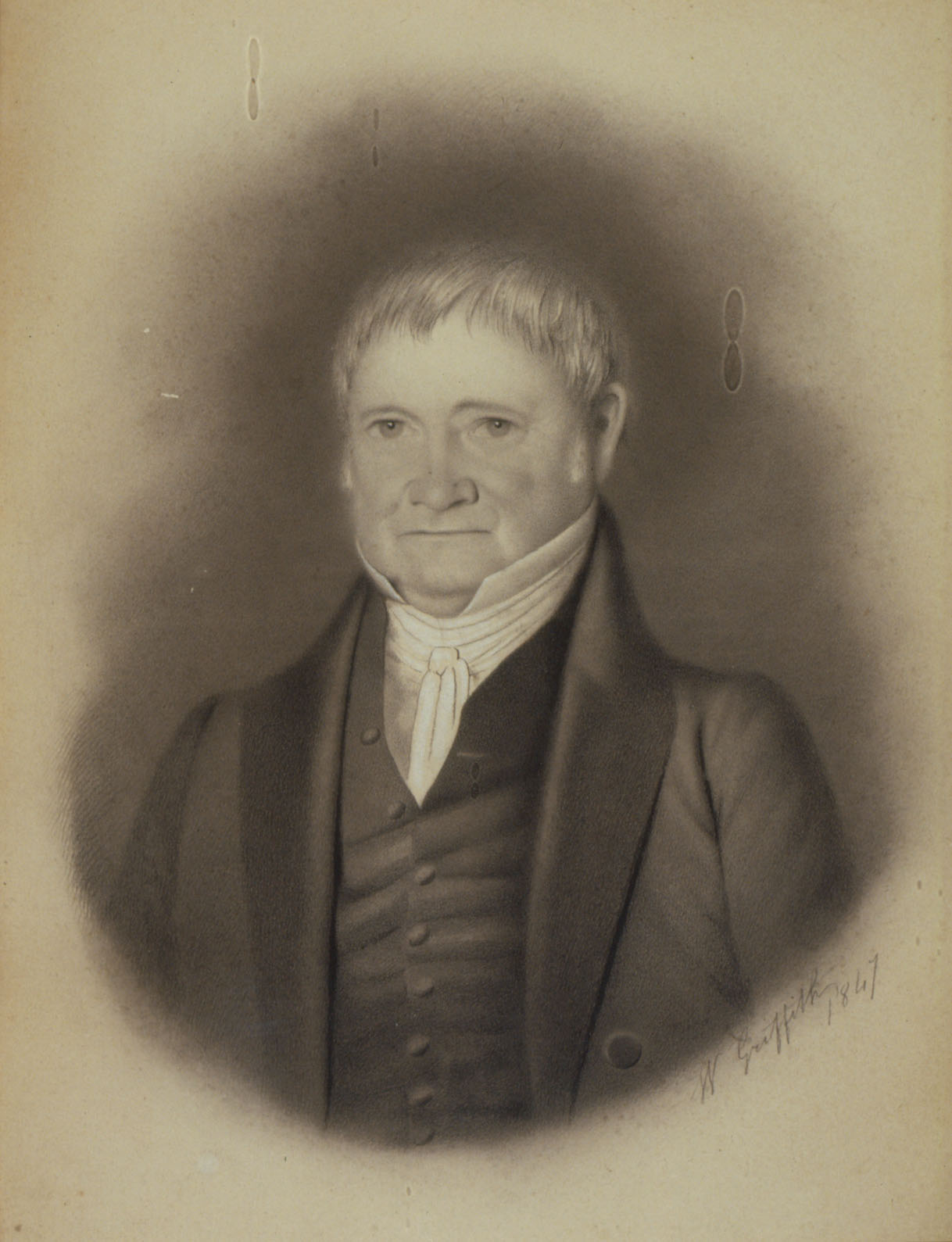 Portret Richarda Rouse